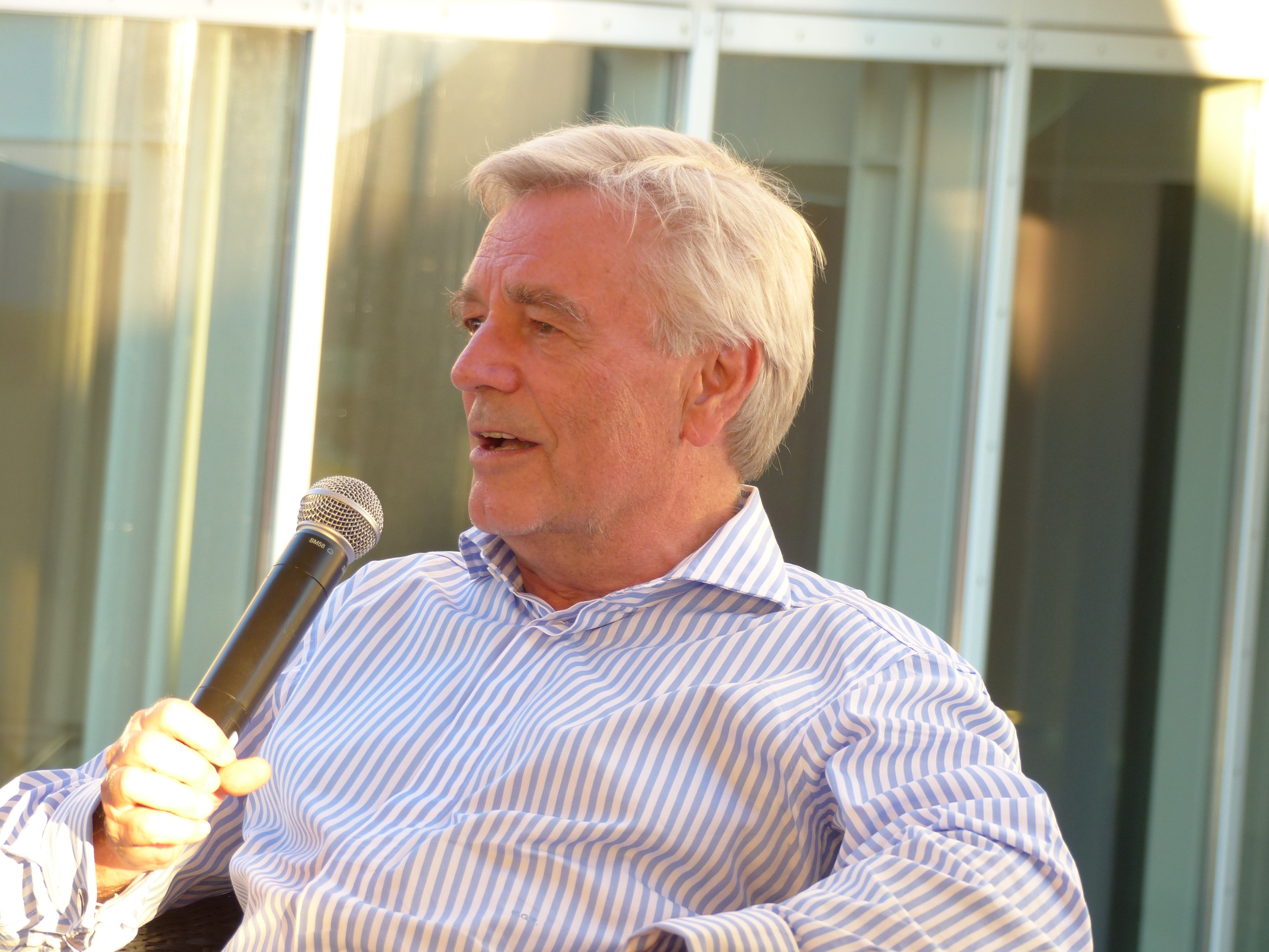 Alexander Hoffmann bei einer Veranstaltung am Zürichsee